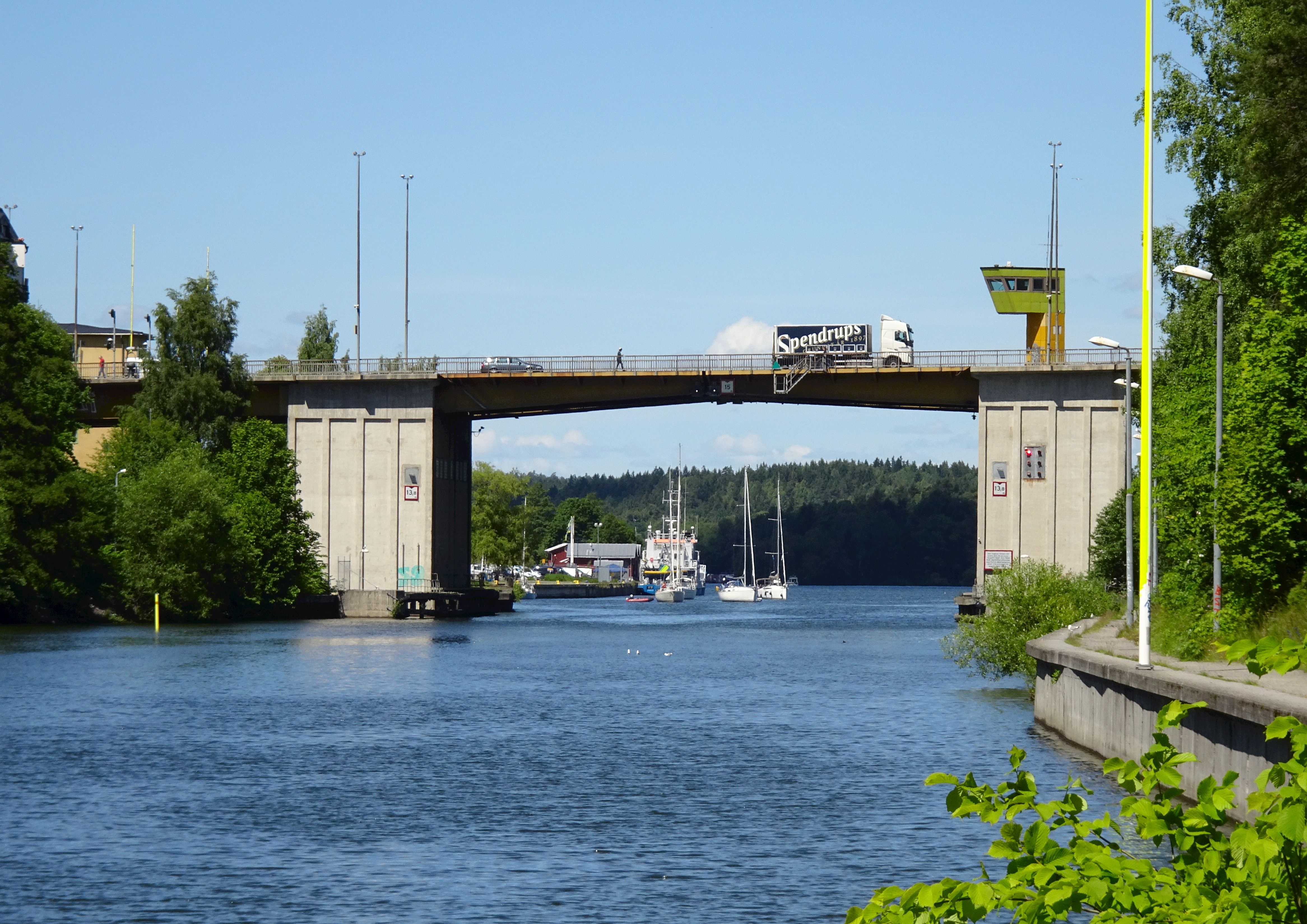 Mälarbron, Södertälje, tornet